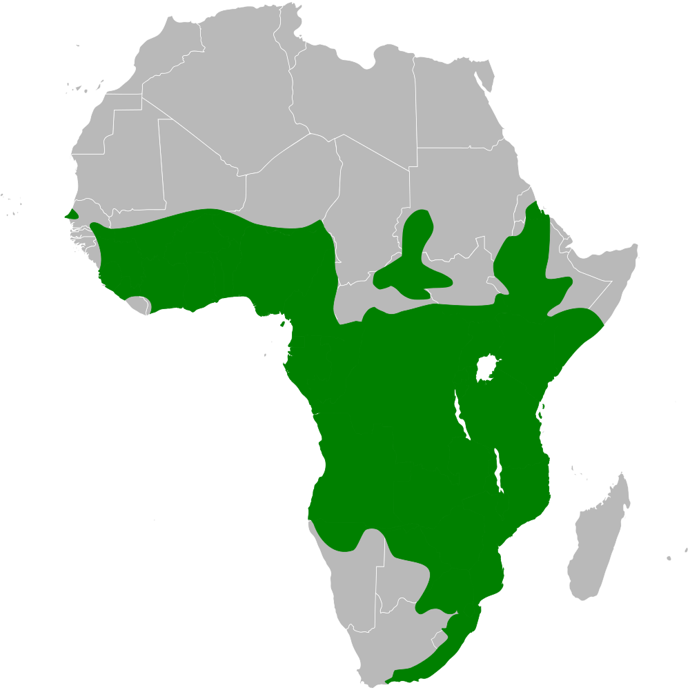 Cecropis abyssinica distribution map, based on